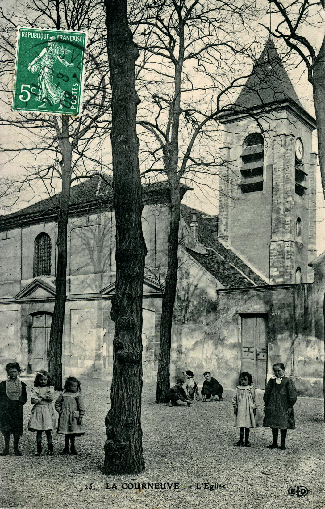 Carte postale ancienne éditée par ELD, N°25La Courneuve : L'église Saint Lucien